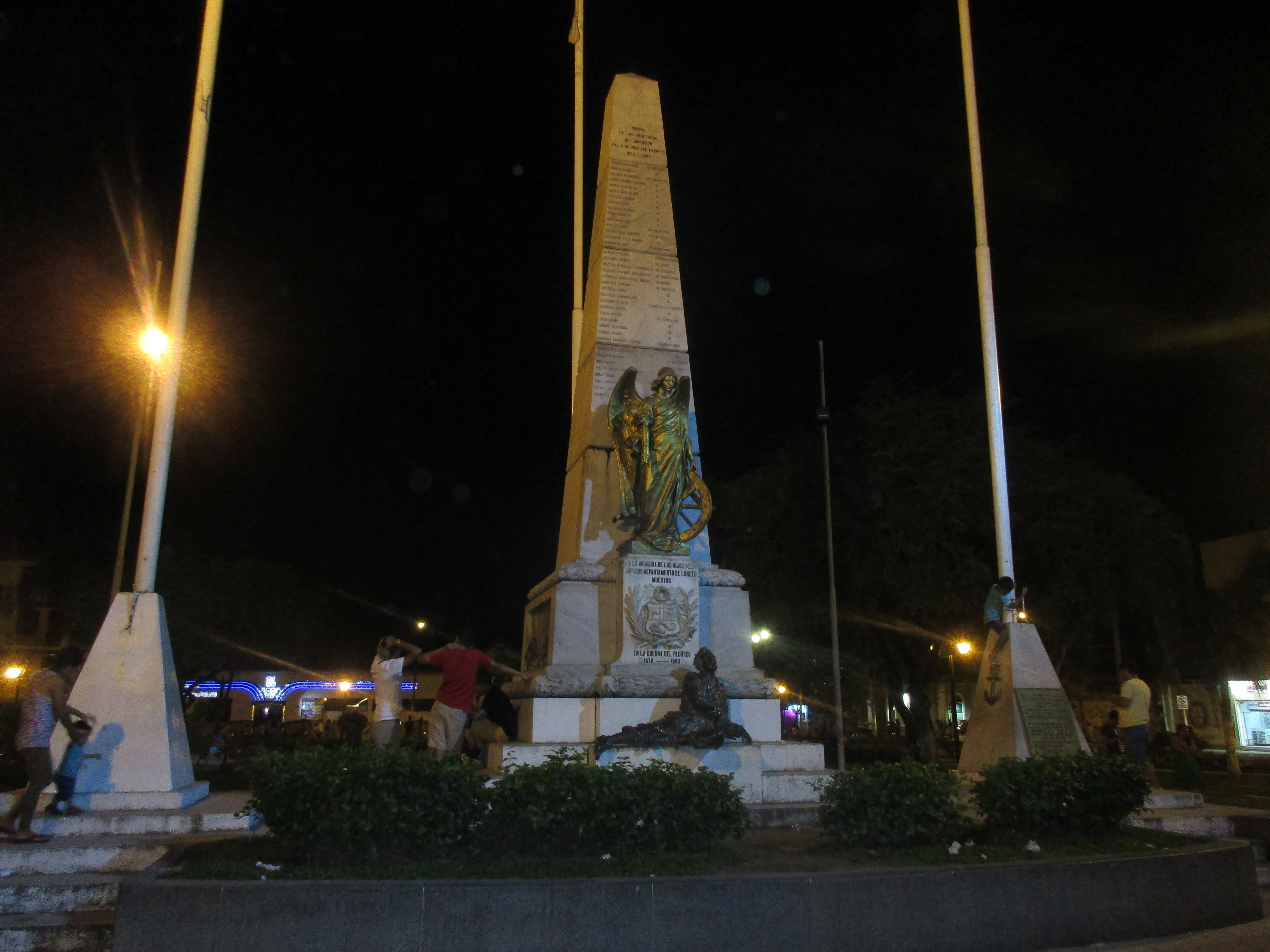 Obelisco de la Plaza de Armas de Iquitos durante la noche